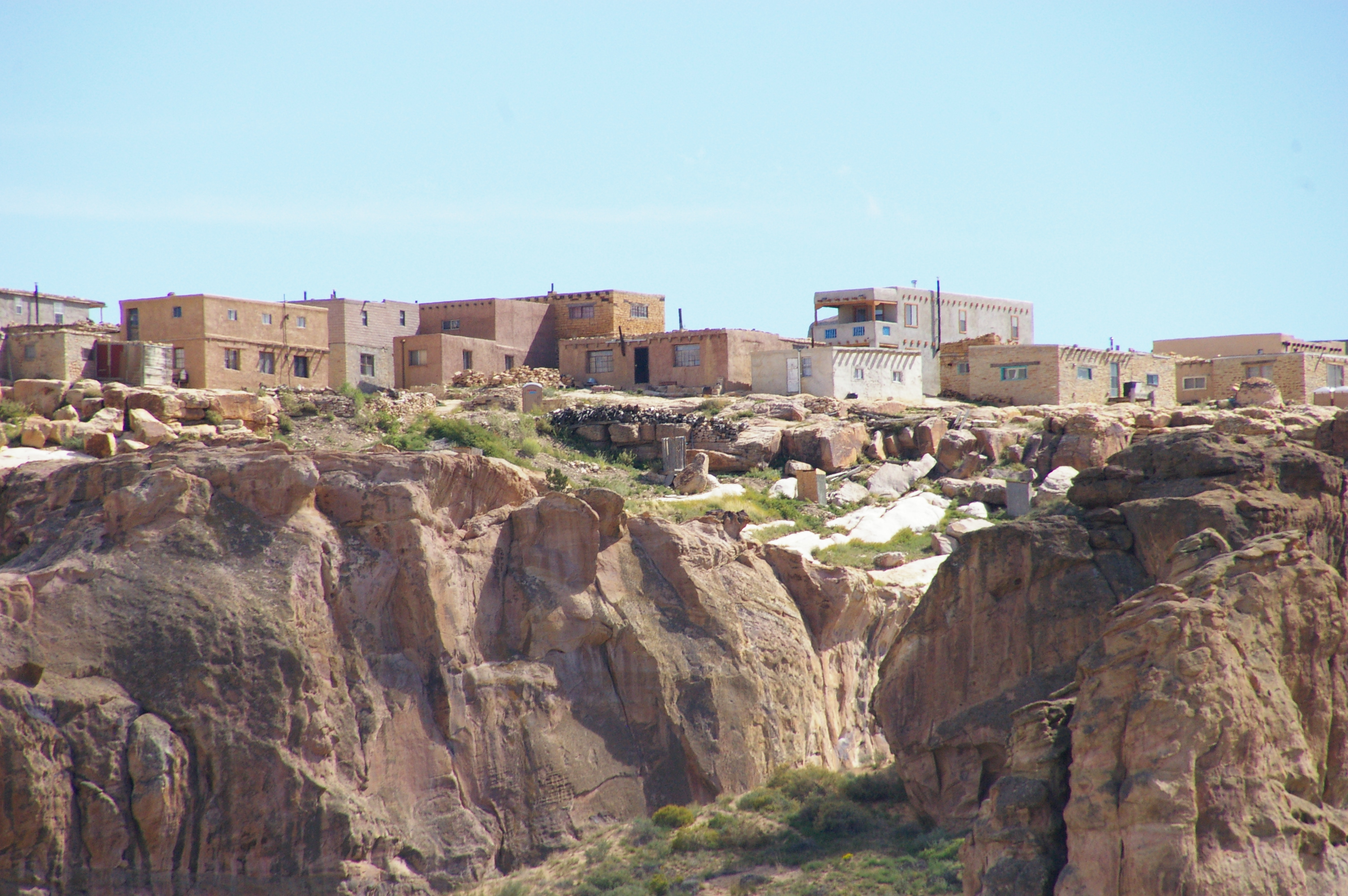 Acoma Pueblo, New Mexico, USA